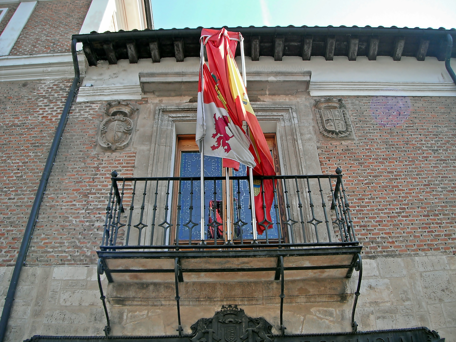 Palacio de Pimentel (Valladolid)